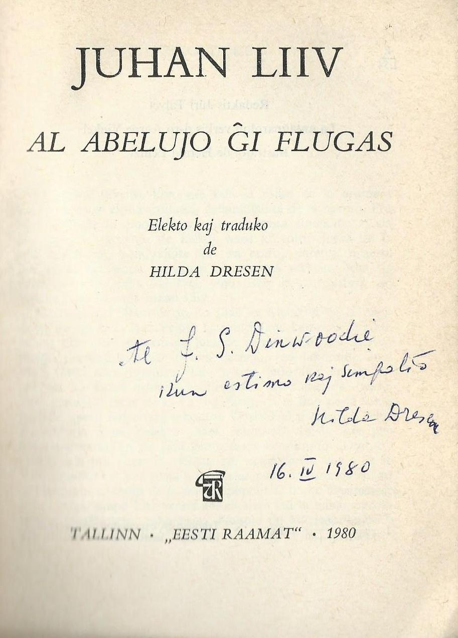 librokovrilo de "Al Abelujo Ĝi Flugas", 1980